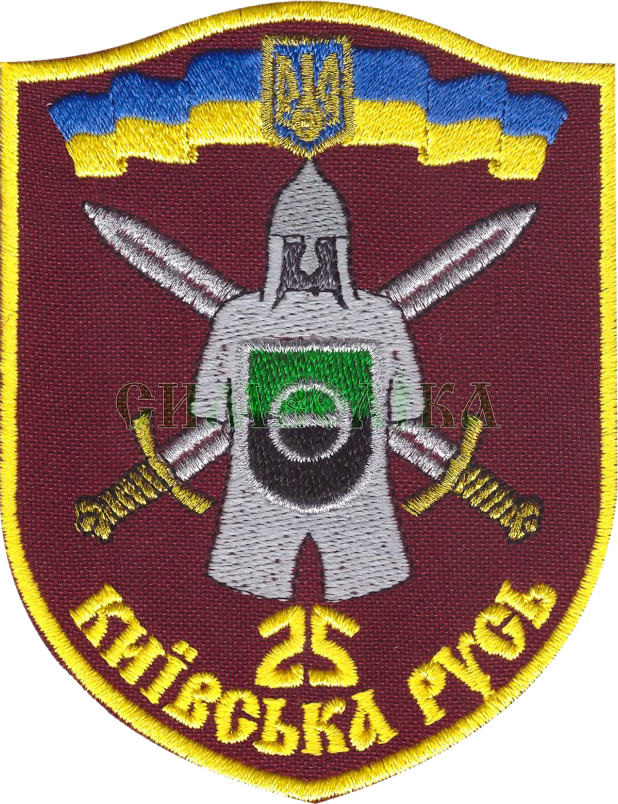 Нарукавний знак, 25 окремий моторизований піхотний батальйон